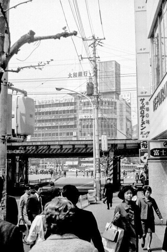 Detail from Tokyo